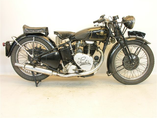 Sunbeam High Camshaft Model B 24 (350 cc)) uit 1939.